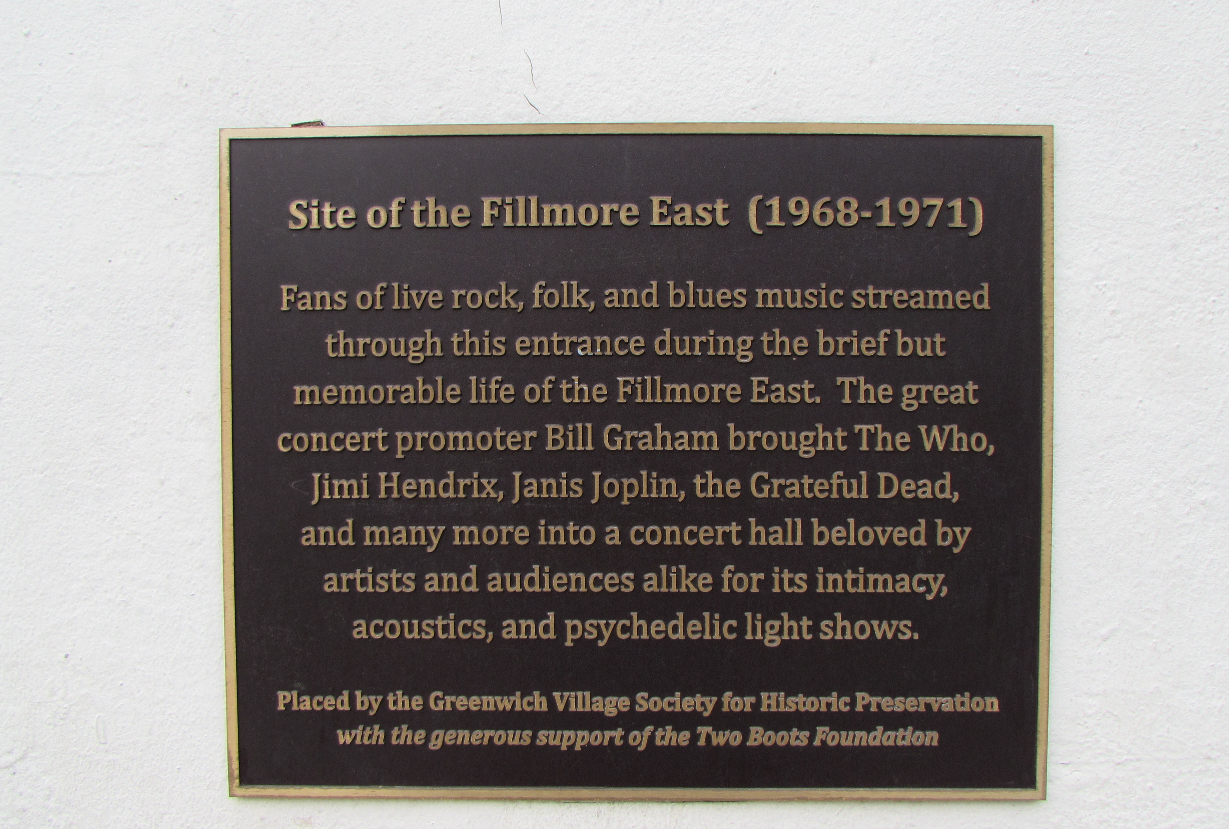 Targa a ricordo Fillmore East